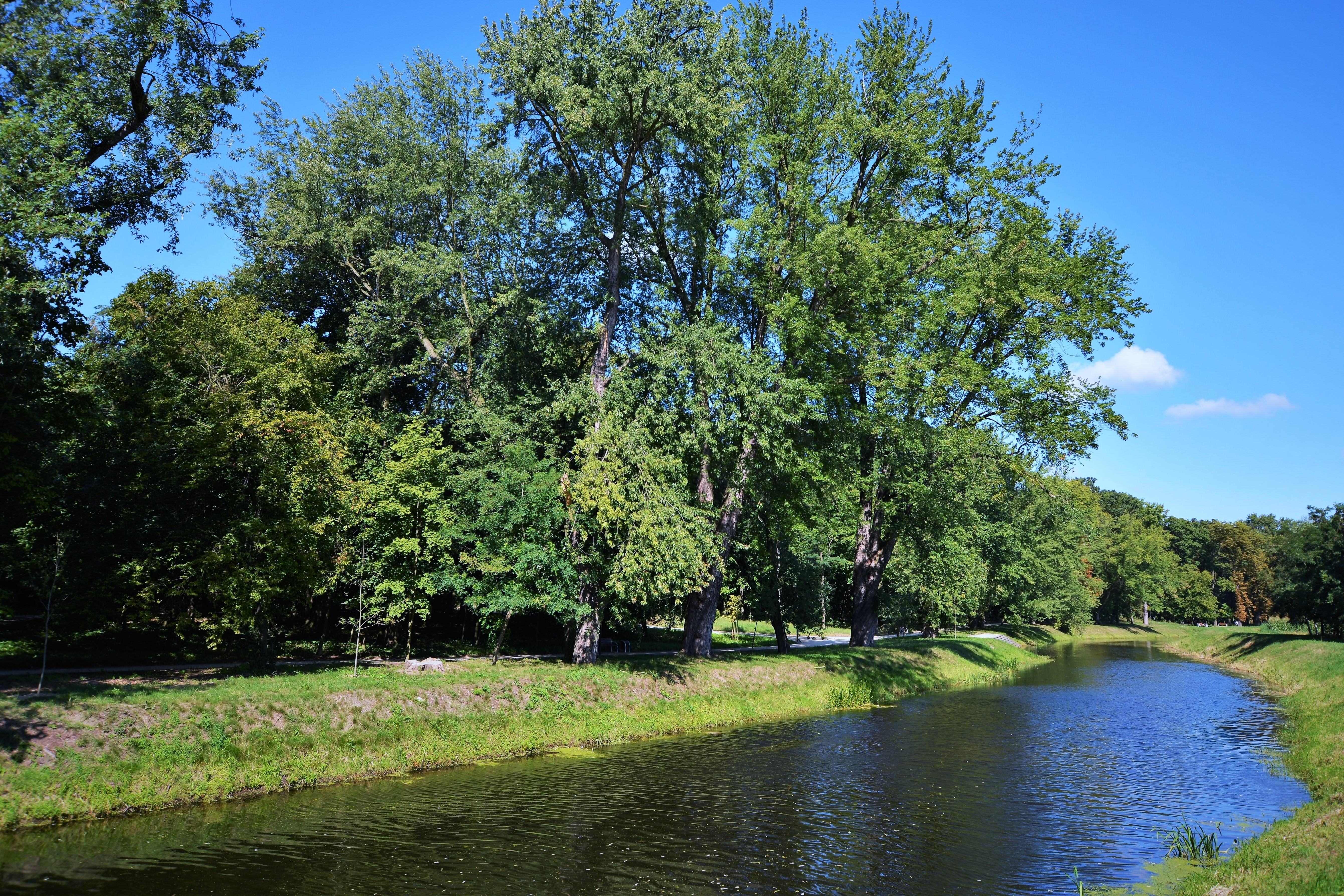 Ppark miejski w koscianie i rzeka obra